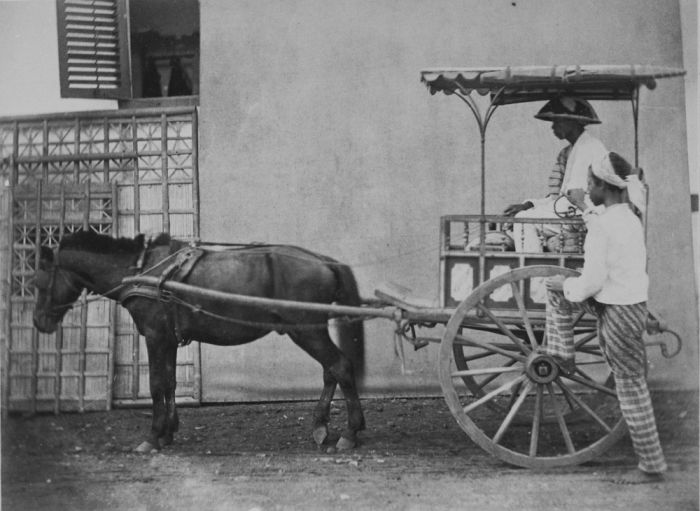 foto. Een door een paard voortgetrokken rijtuig, met op de achtergrond een bamboe wand en een scherm die dienst doen als decor in een fotostudio